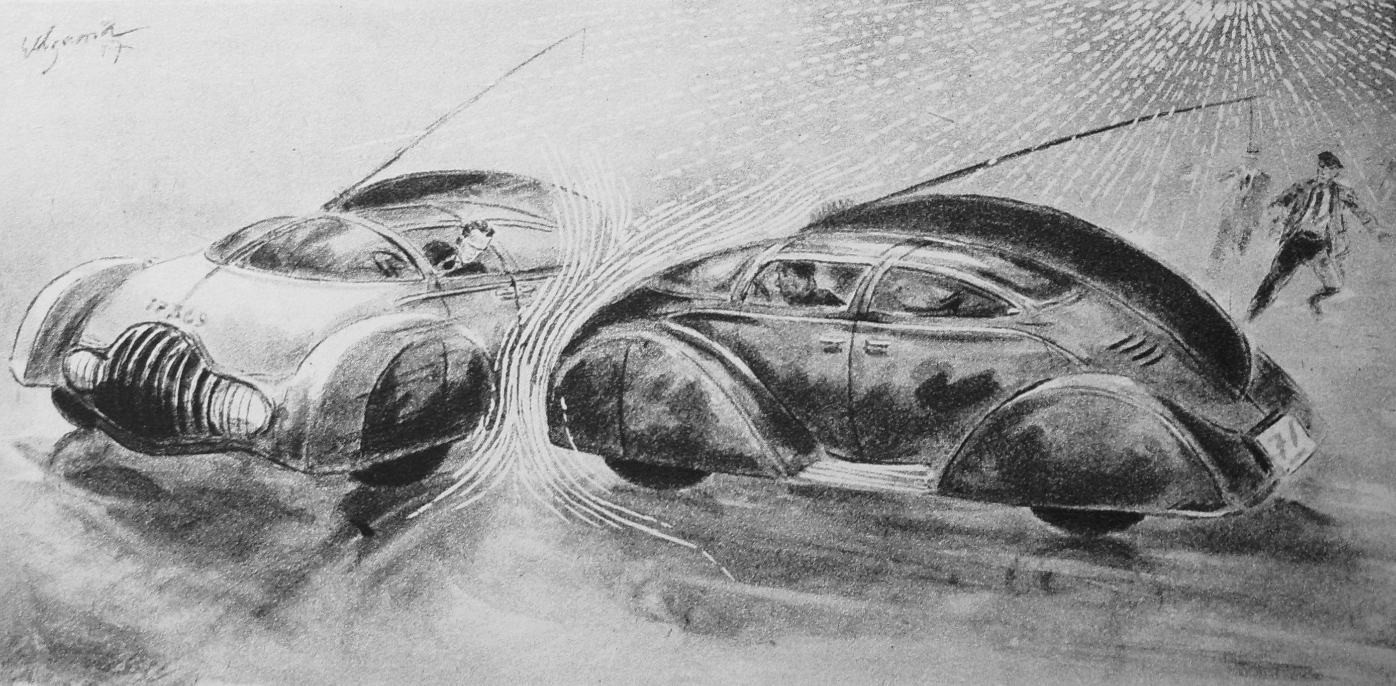 Illustration von Helmuth Ellgaard in der Neuen Berliner Illustrierten zum Bericht "Verkehr von übermorgen" - Zusammenstösse werden unmöglich